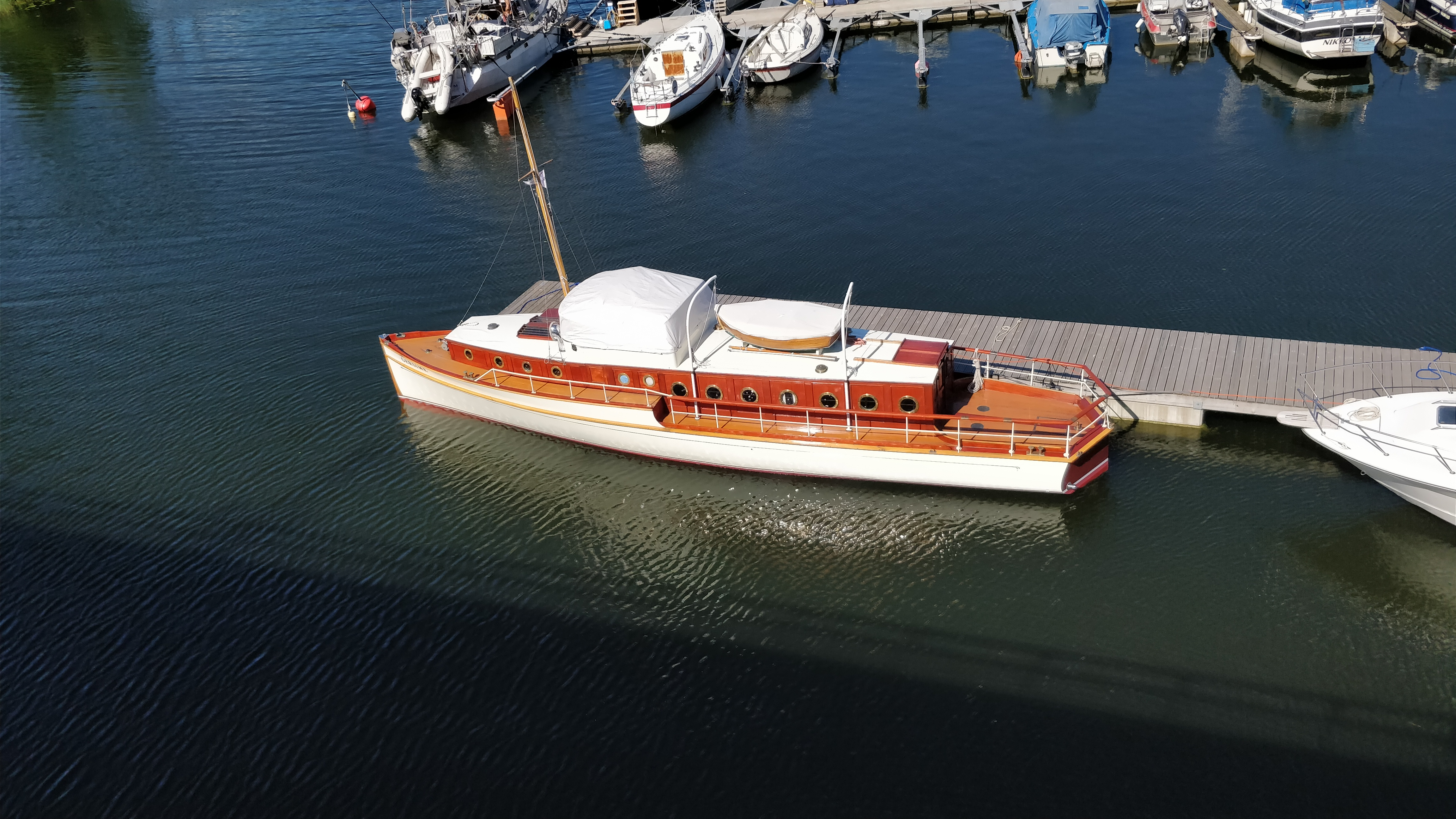 M/Y Gersime fotograferad vid Rörstrands båtklubb